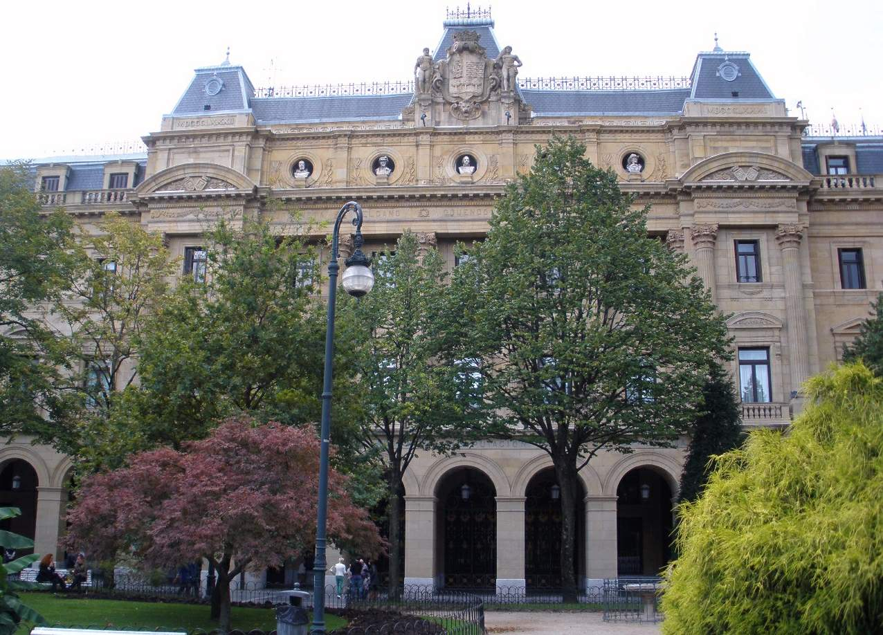 San Sebastian - Diputacion Foral de Gipuzkoa